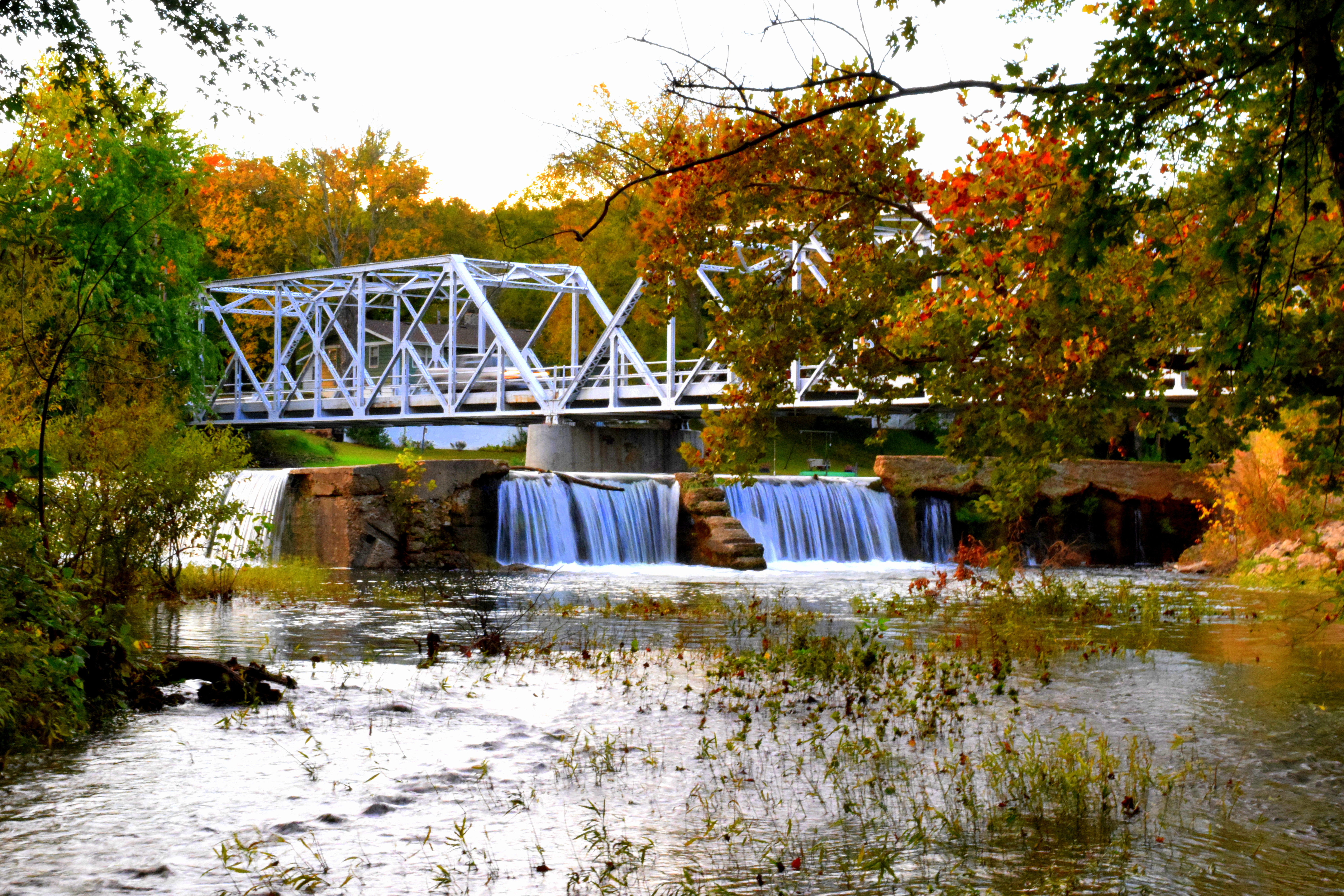 Finley River in Ozark